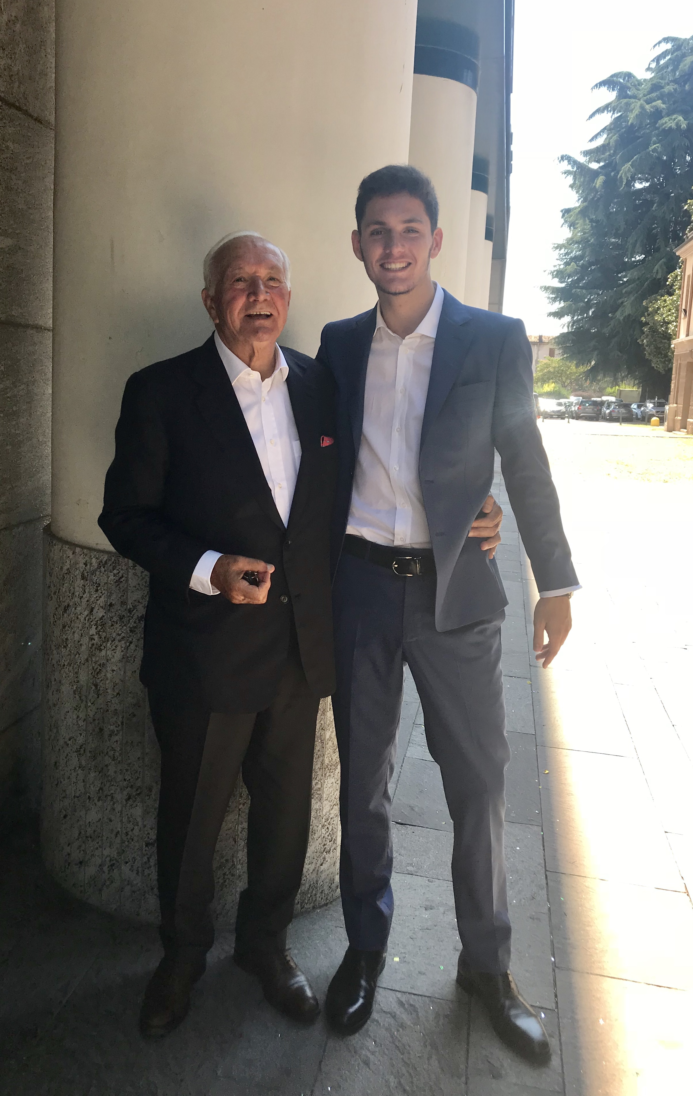 Alcide Cerato con il nipote Alexander nel 2018.